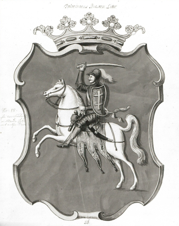 Беларуская (тарашкевіца): Герб Берасьцейскага ваяводзтва (Bieraście) з Пагоняй (Pahonia)